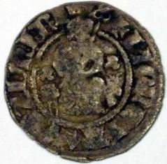 Kwartnik Kazimierza Wielkiego. Awers. autor: mzopw licencja: GNU FDL